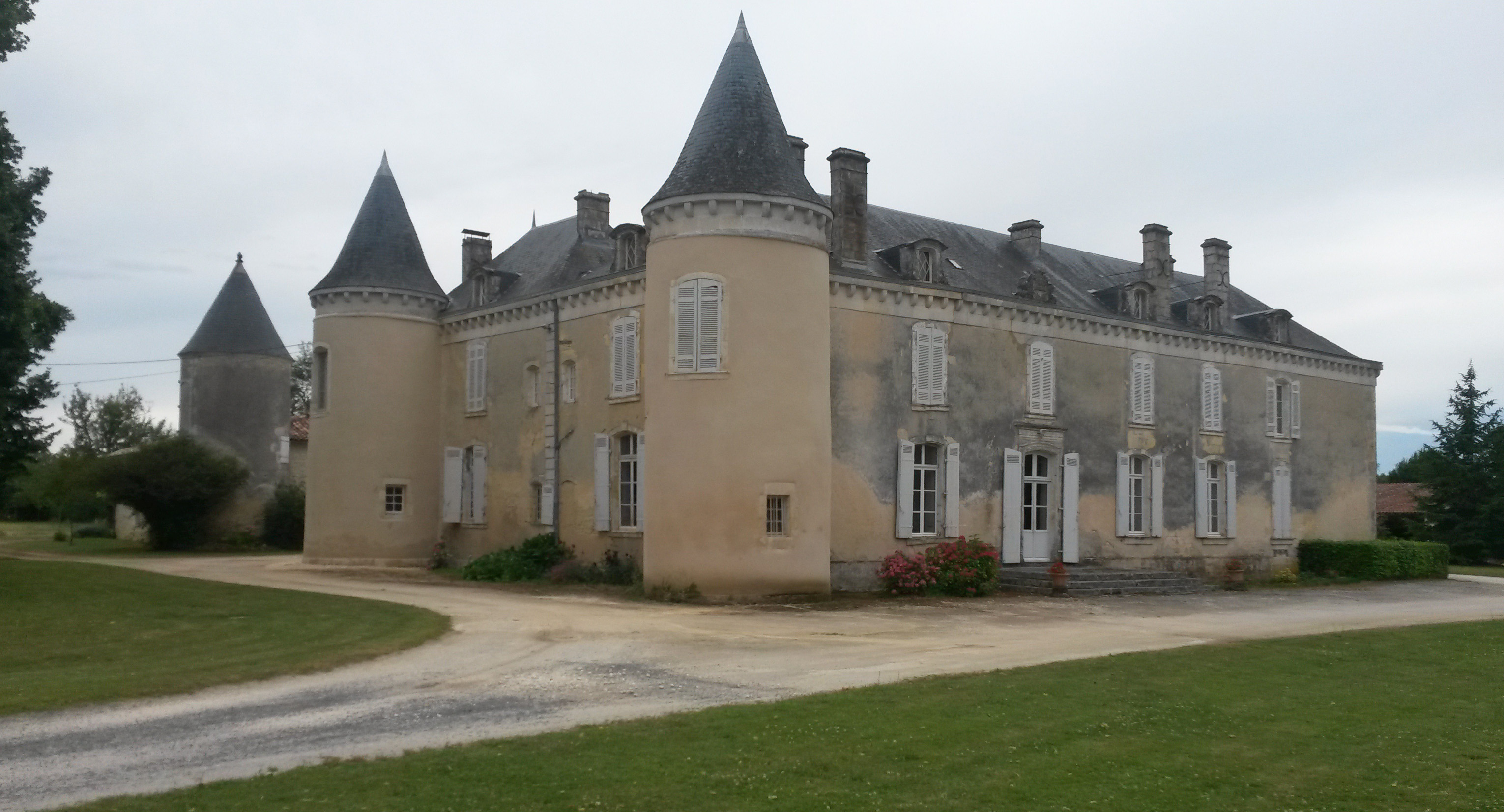 Photographie du château de Malvillars